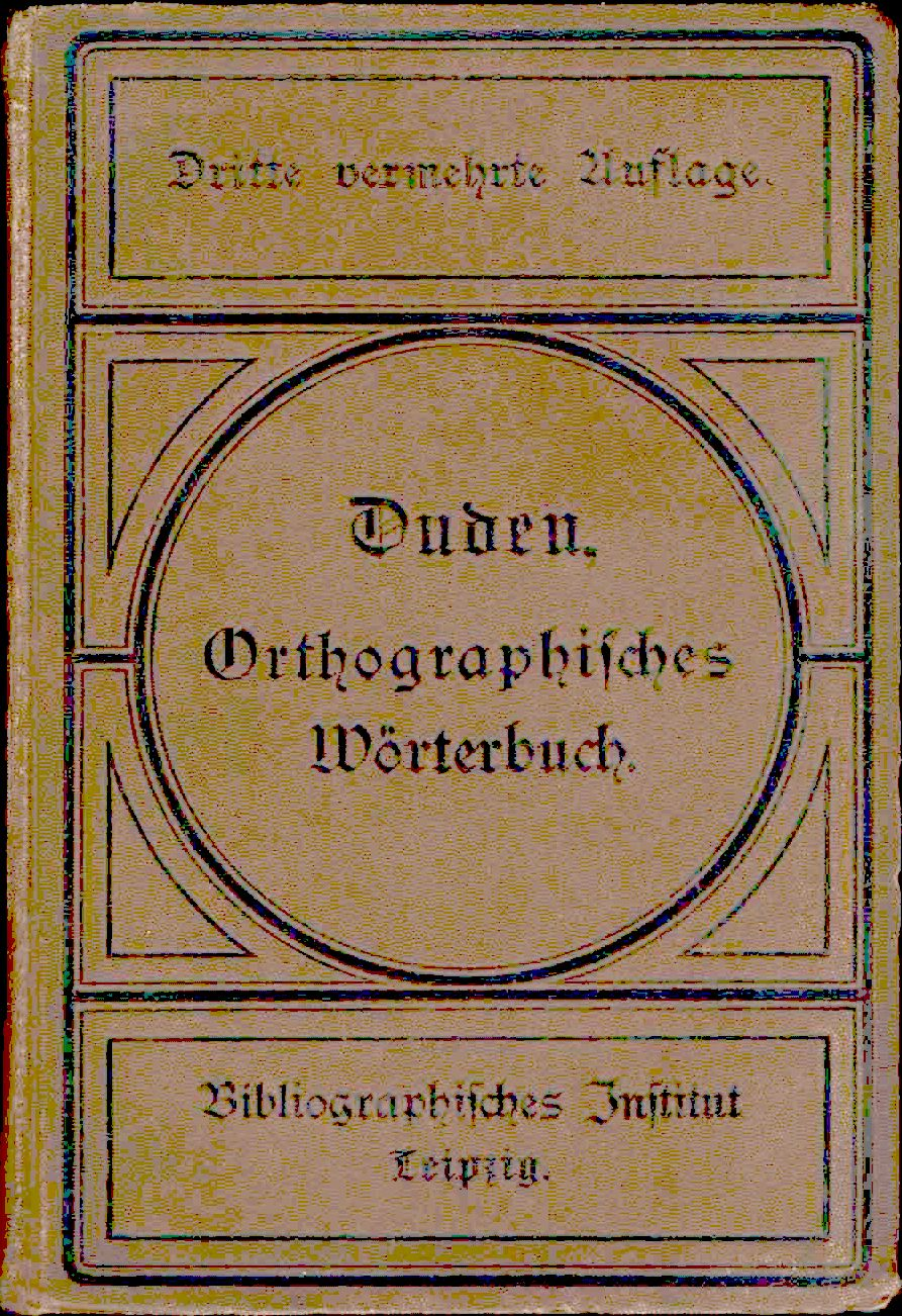 Einband von Vollständiges Orthographisches Wörterbuch der deutschen Sprache mit etymologischen Angaben, kurzen Sacherklärungen und Verdeutschungen der Fremdwörter von Konrad Duden. Nach den neuen amtlichen Regeln. Dritte, umgearbeitete und vermehrte Auflage. Neuer Abdruck. Leipzig und Wien. Verlag des Bibliographischen Instituts. 1891.